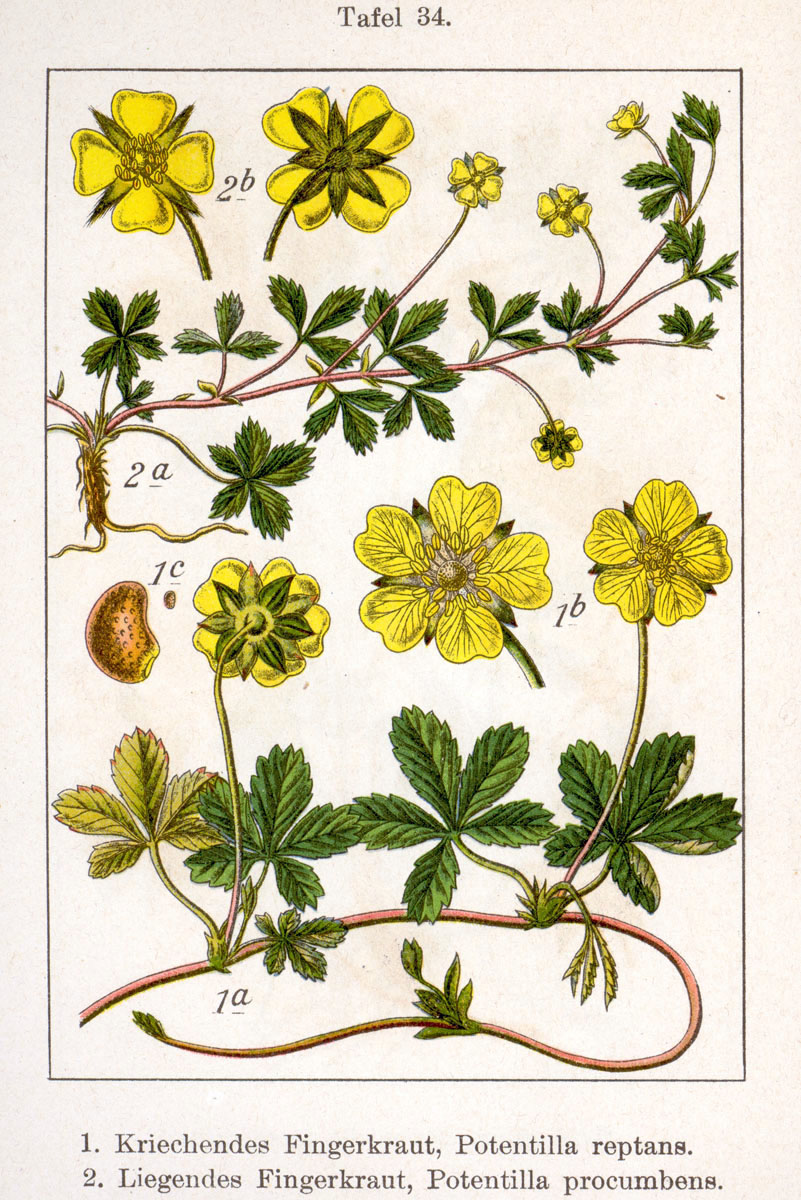 1. Potentilla reptans L. 2. Potentilla anglica subsp. anglica, syn. Potentilla procumbens Sibth. Original Description 1. Kriechendes Fingerkraut, Potentilla reptans 2. Liegendes Fingerkraut, Potentilla procumbens